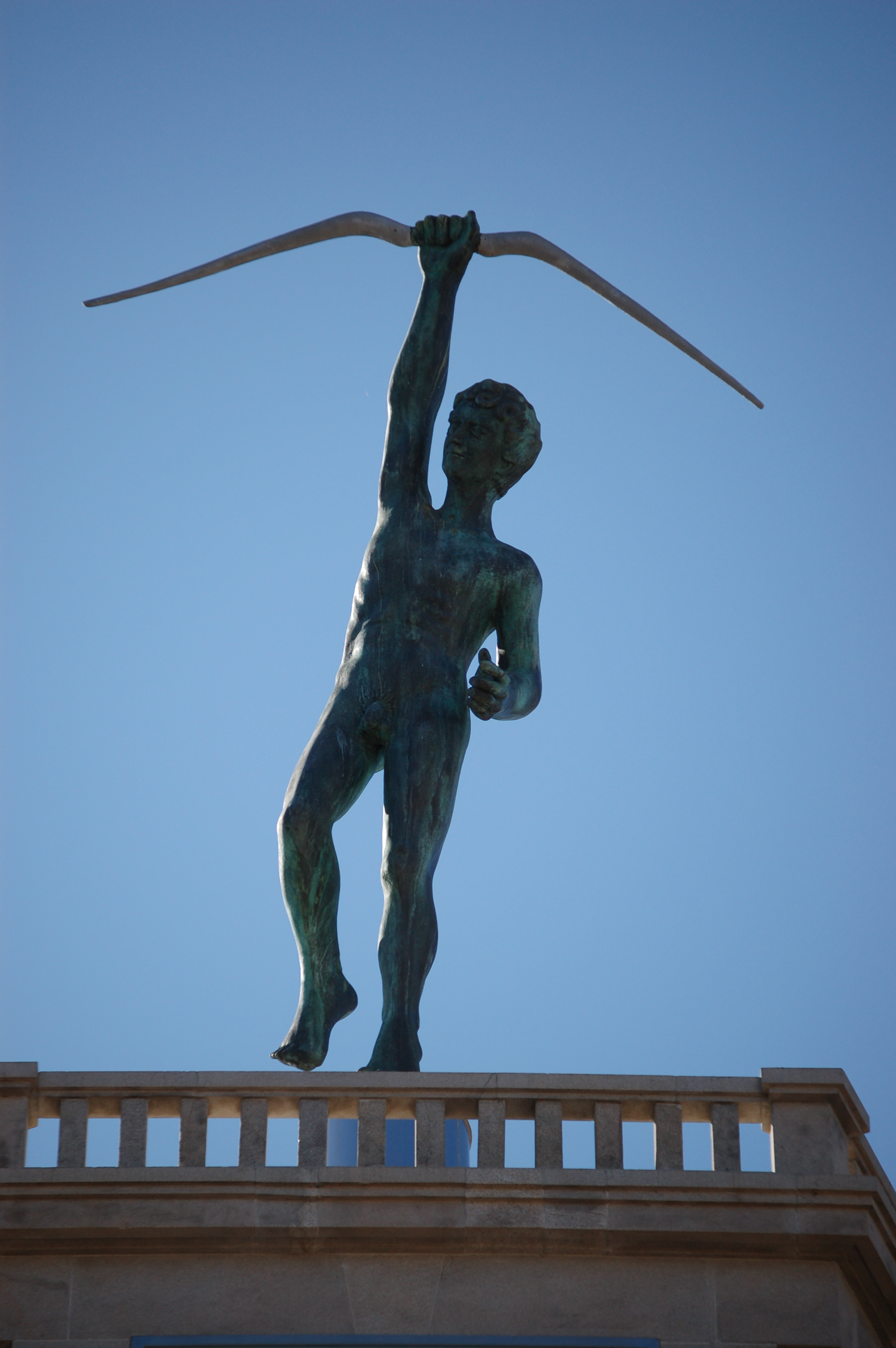 Estatua de Teucro na sede de Afundación en Pontevedra